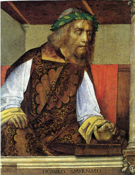 Homero Smyrnaeo (Omero) - Studiolo di Federico da Montefeltro